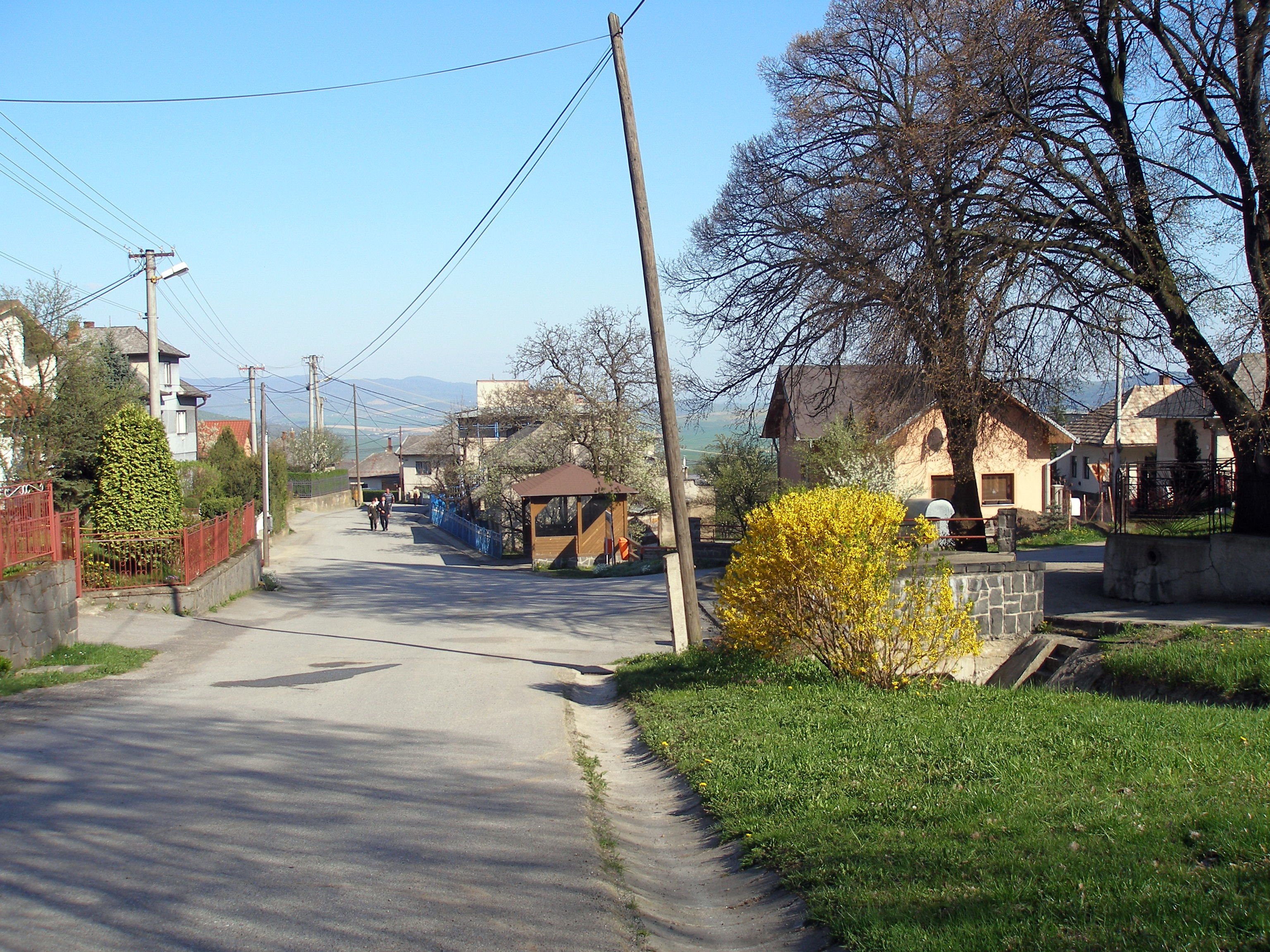 Obec Okružná okres Prešov región Šariš